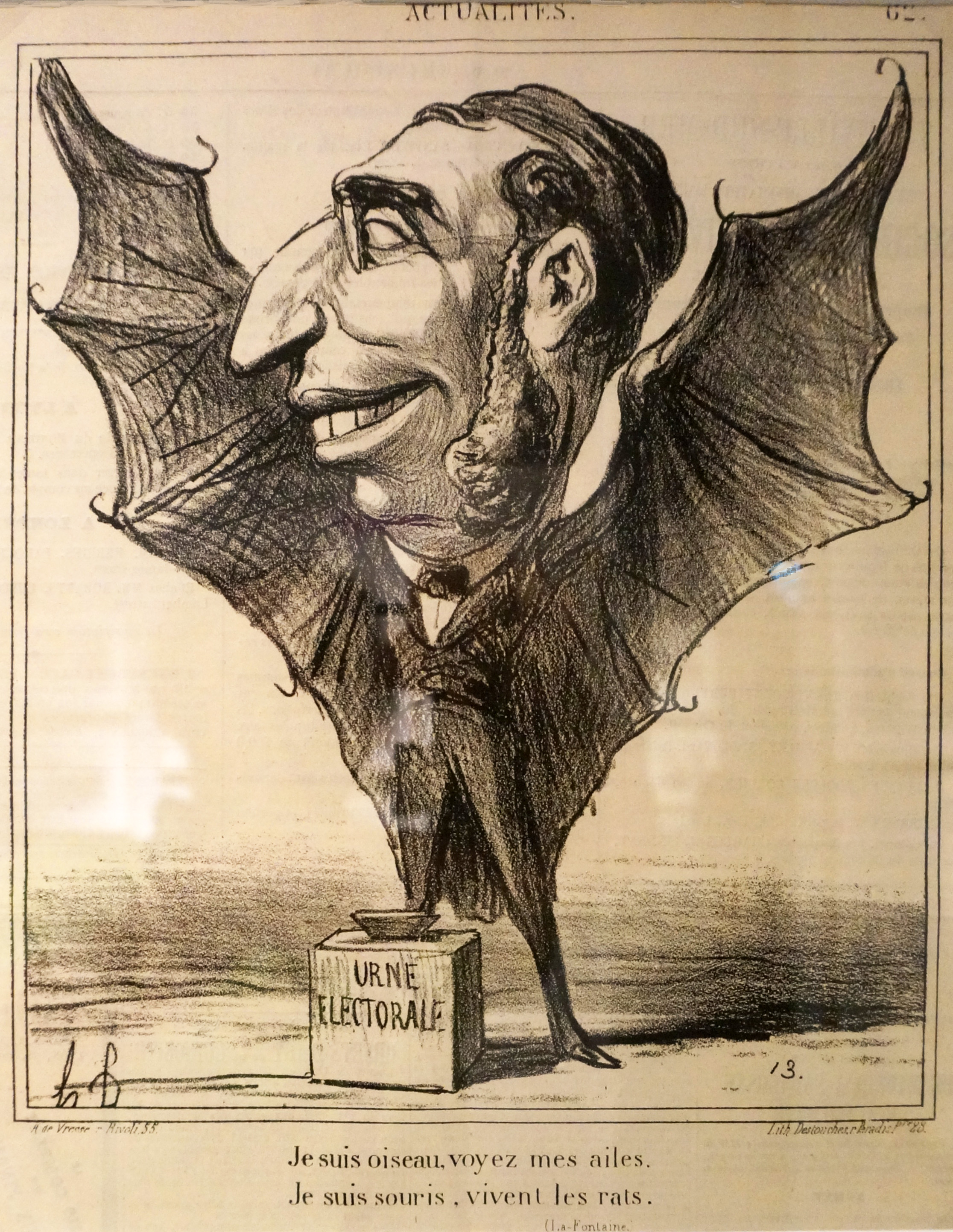 présenté lors de l'Exposition Daumier, Musée de la Franc-Maçonnerie.